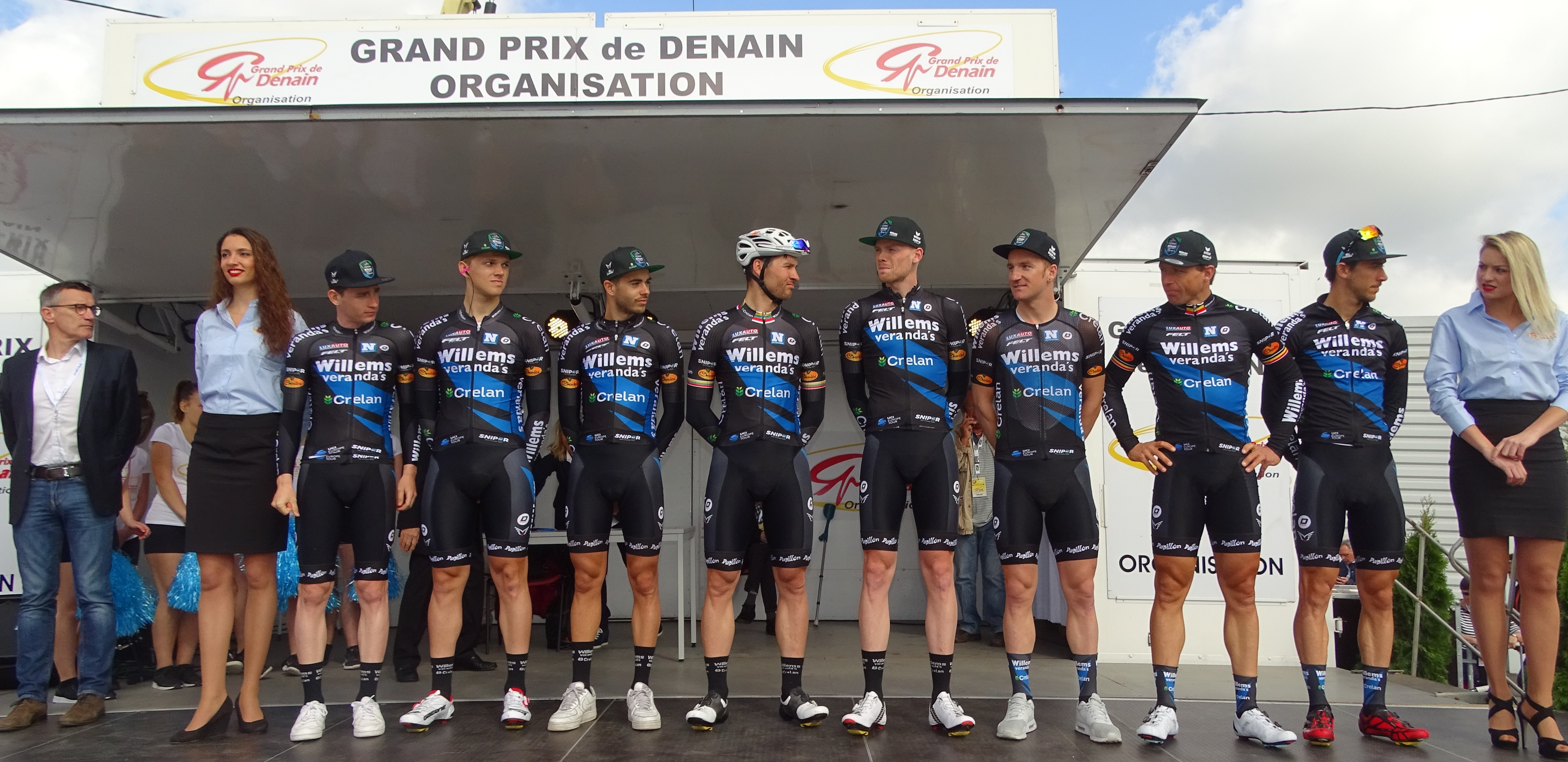 Reportage réalisé le jeudi 13 avril à l'occasion du départ et de l'arrivée du Grand Prix de Denain 2017 à Denain, Nord, Nord-Pas-de-Calais-Picardie, France.